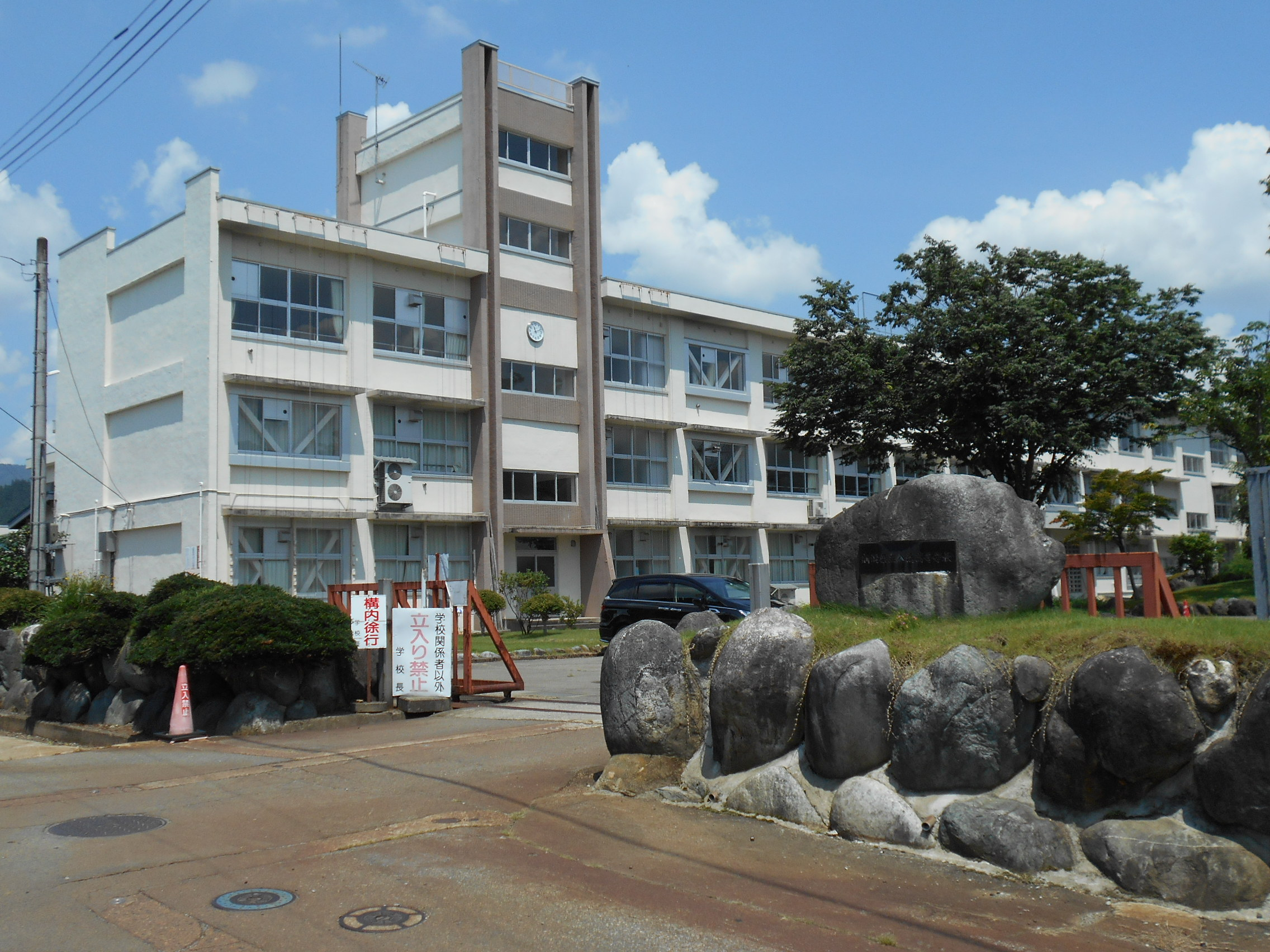 新潟県立八海高等学校